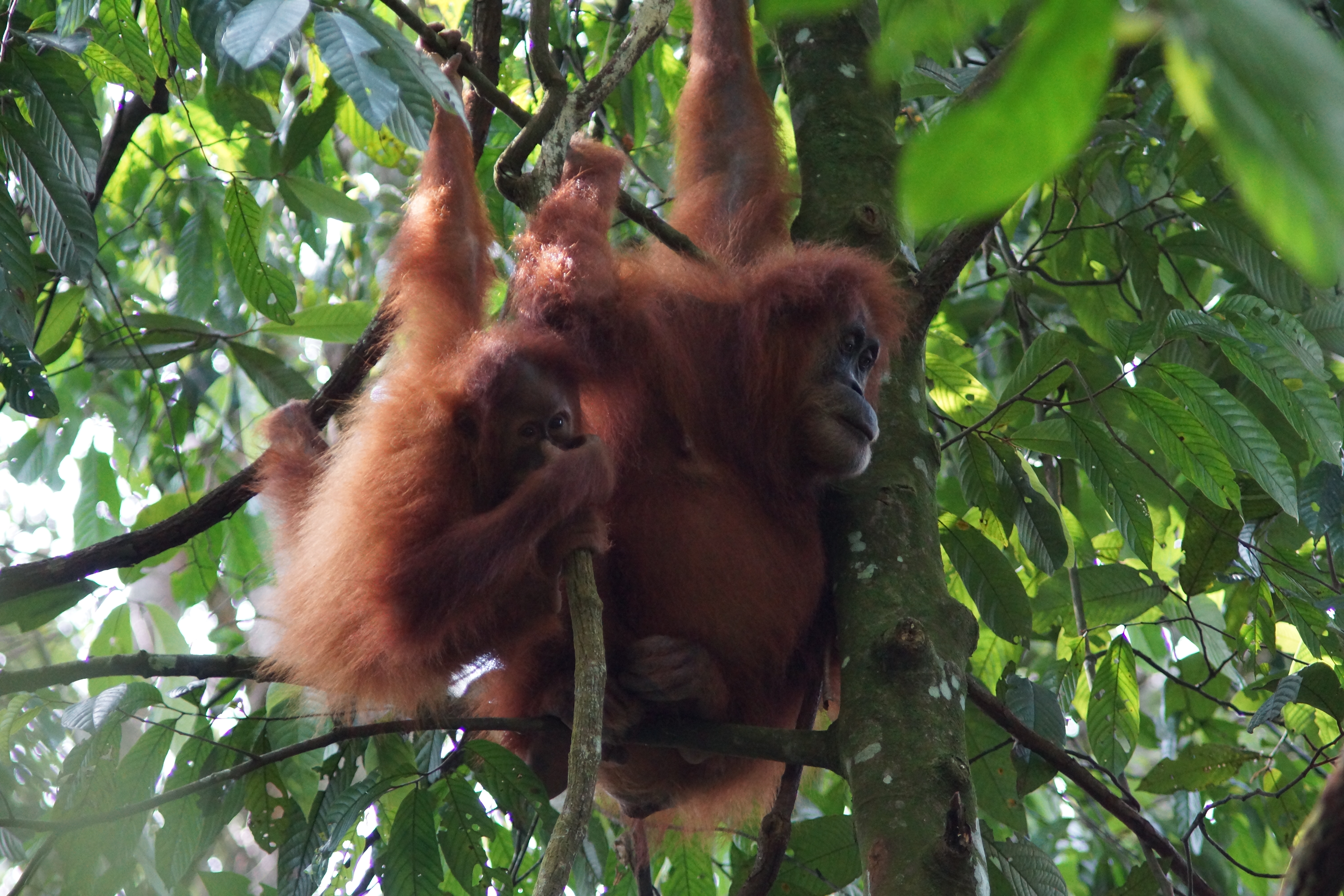 Setelah berjalan kaki selama 3 jam, pengunjung bisa bertemu dengan keluarga Orang Utan Sumatra yang masuk ke kategori semi liar. Dikatakan semi liar, karena Orang Utan ini sudah terbiasa berinteraksi dengan manusia